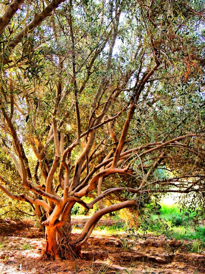 l'arbre d'olive